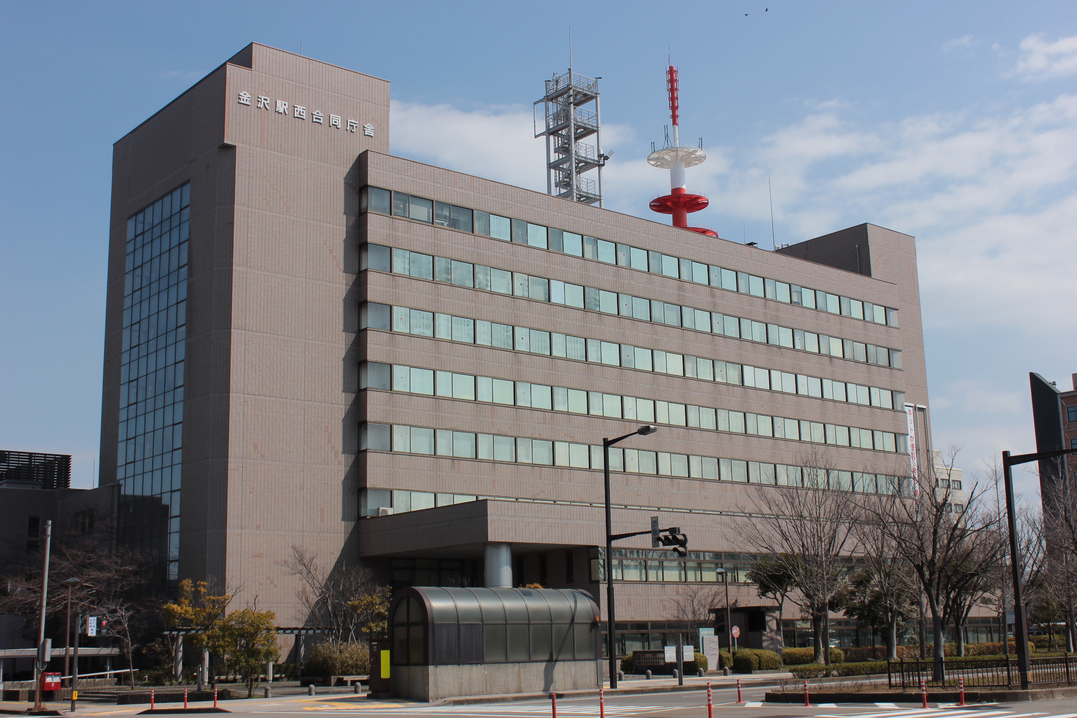 金沢駅西合同庁舎（石川県金沢市西念） Canon EOS Kiss X5